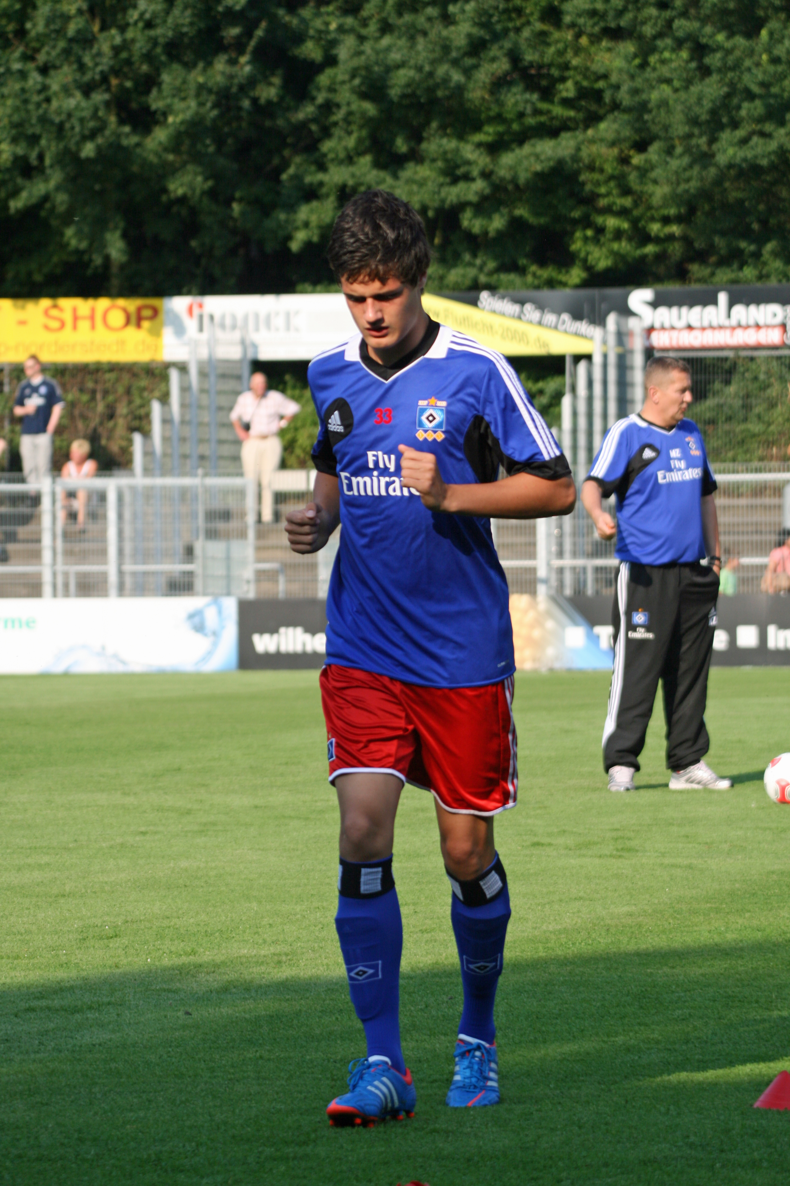 Der dänische Neuzugang Christian Nørgaard mit dem Hamburger HSV beim Saisonvorbereitungsspiel gegen Eintracht Norderstedt / Juli 2012